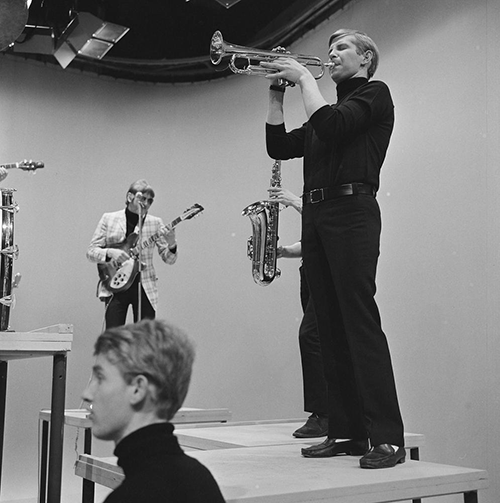 Ekseption in het televisieprogramma Fanclub